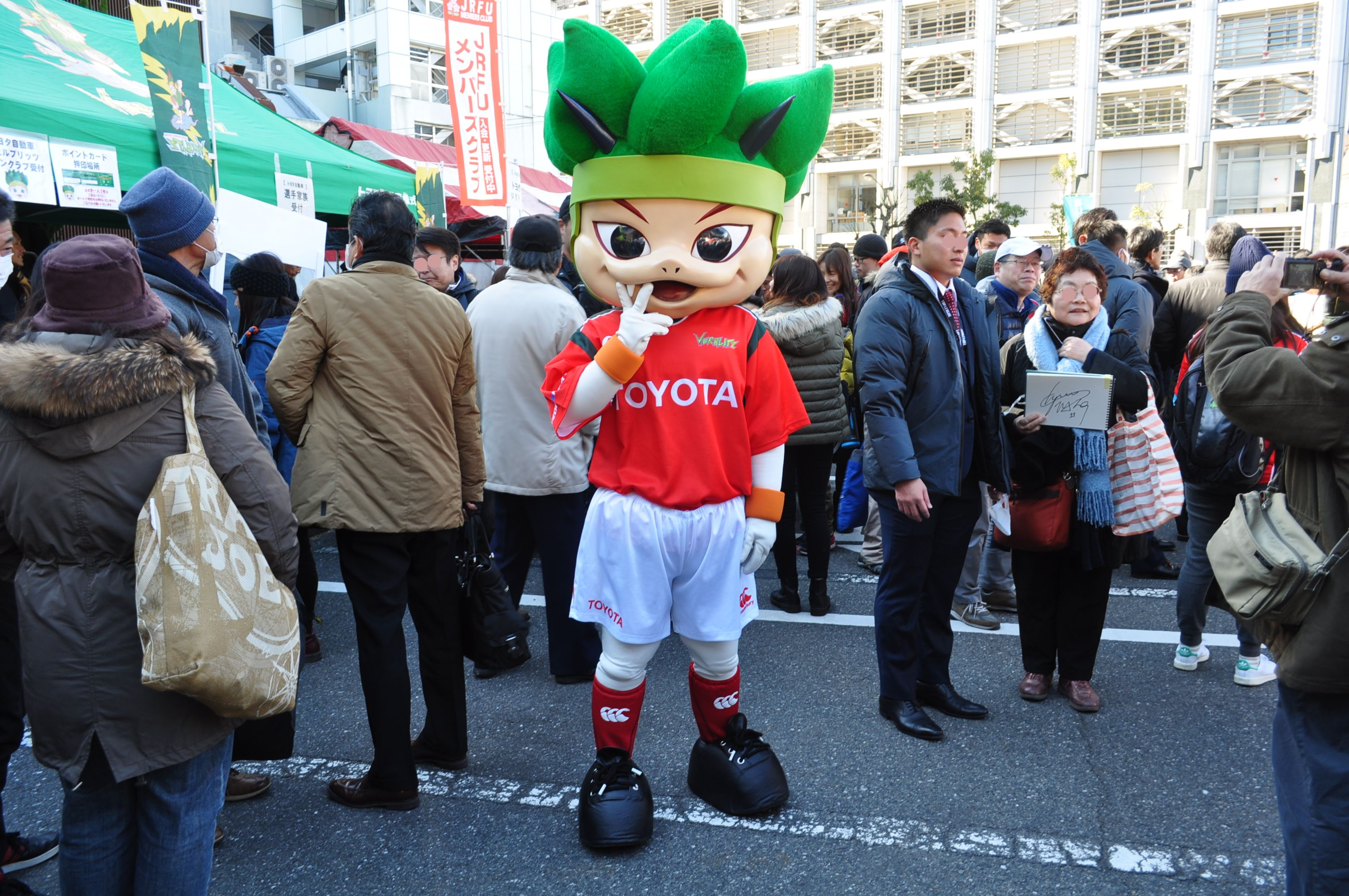 トヨタ自動車ヴェルブリッツ ライガー